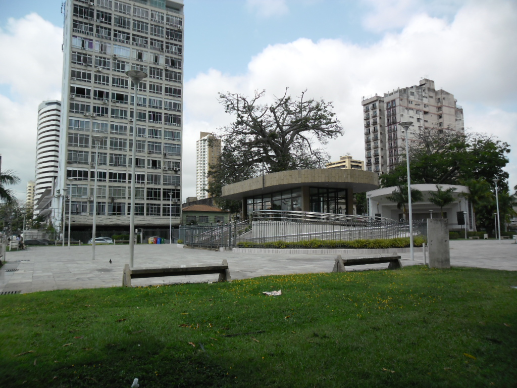 belem